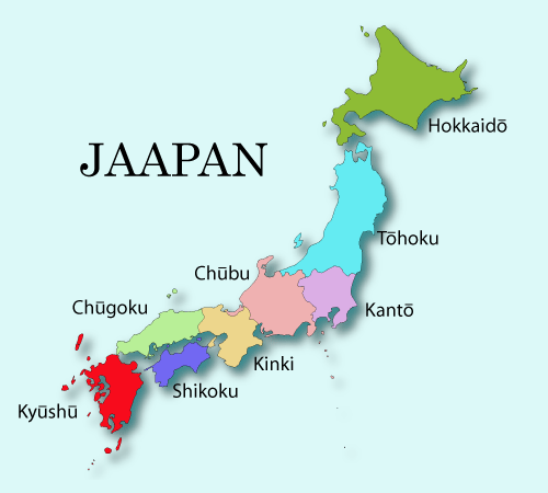 Jaapani piirkonnad